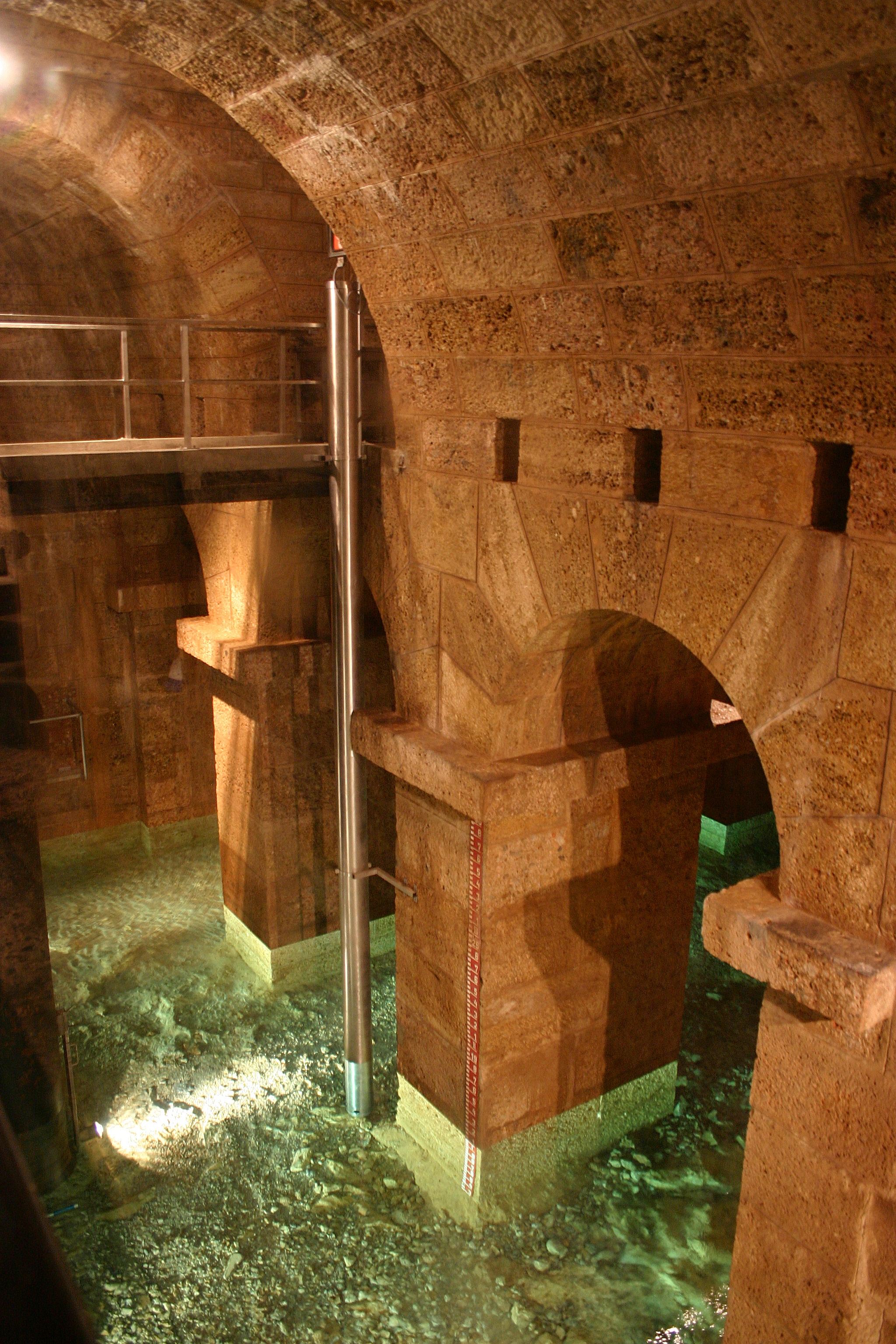 Wasserschloss der I. Wiener Hochquellenwasserleitung in Kaiserbrunn